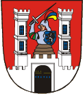 Znak města Uherské Hradiště